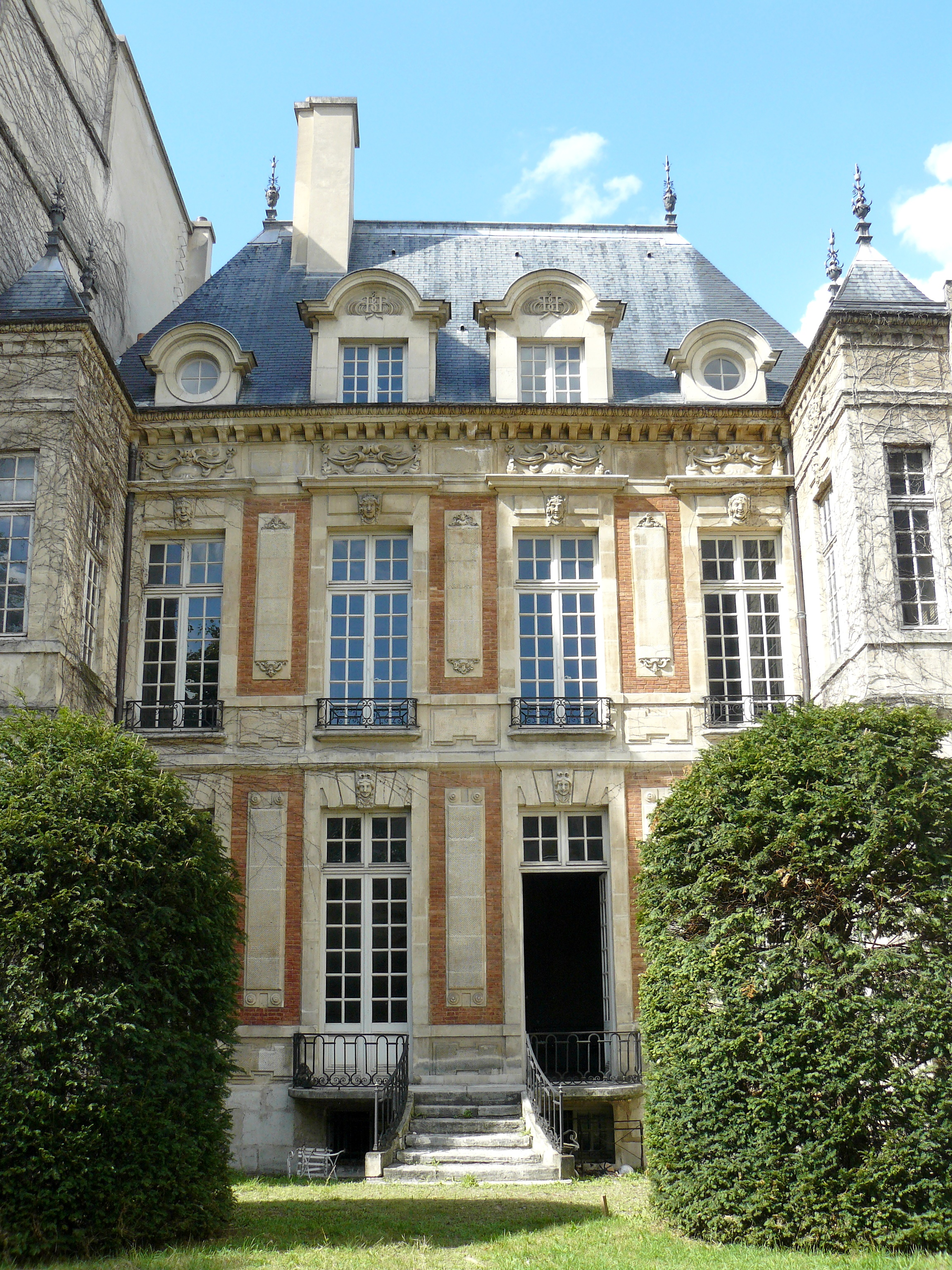 Façade sur jardin de l'hôtel de Chalon-Luxembourg, au 26, rue Geoffroy-l'Asnier, Paris (4e arrond.).